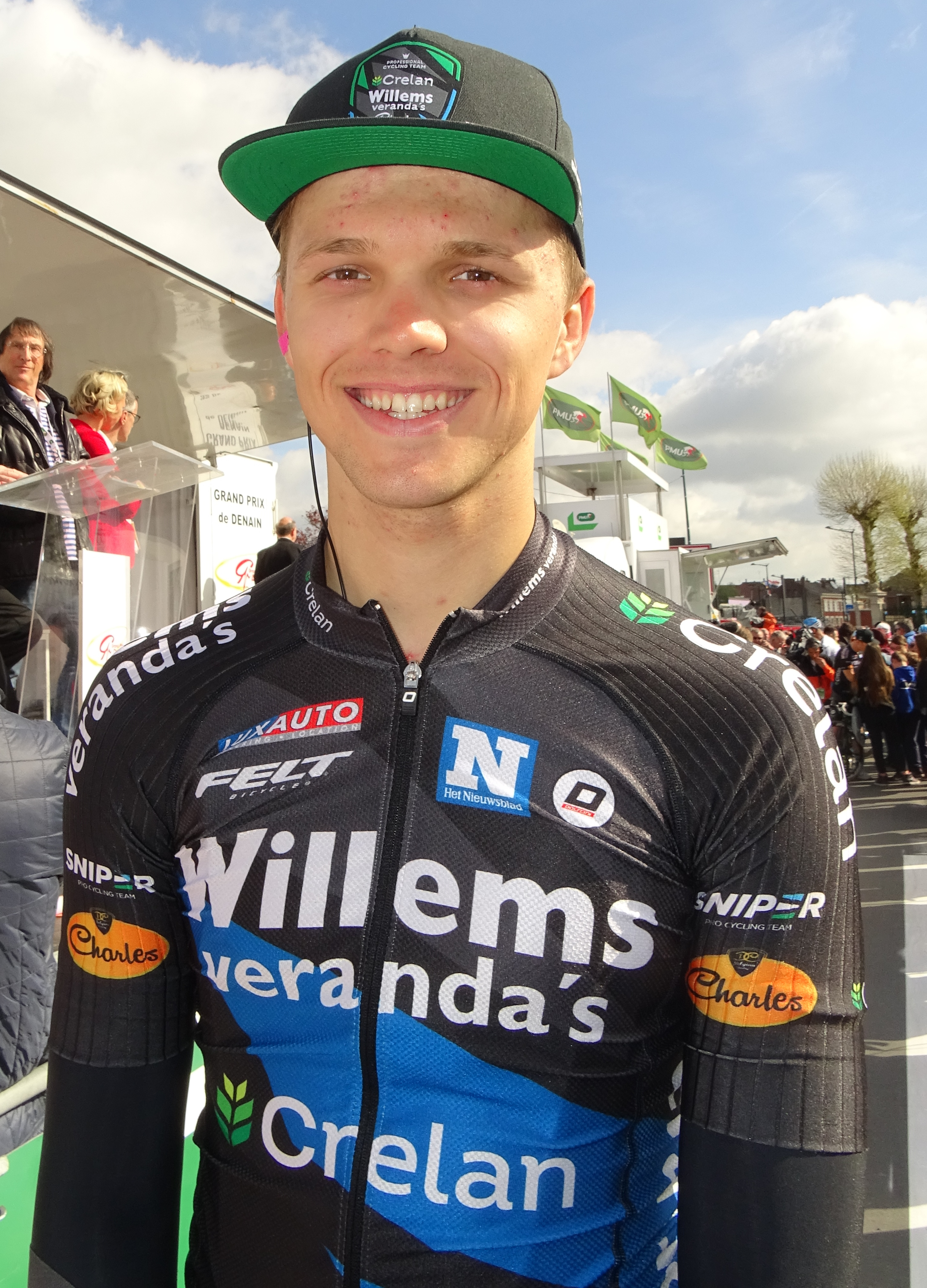 Reportage réalisé le jeudi 13 avril à l'occasion du départ et de l'arrivée du Grand Prix de Denain 2017 à Denain, Nord, Nord-Pas-de-Calais-Picardie, France.